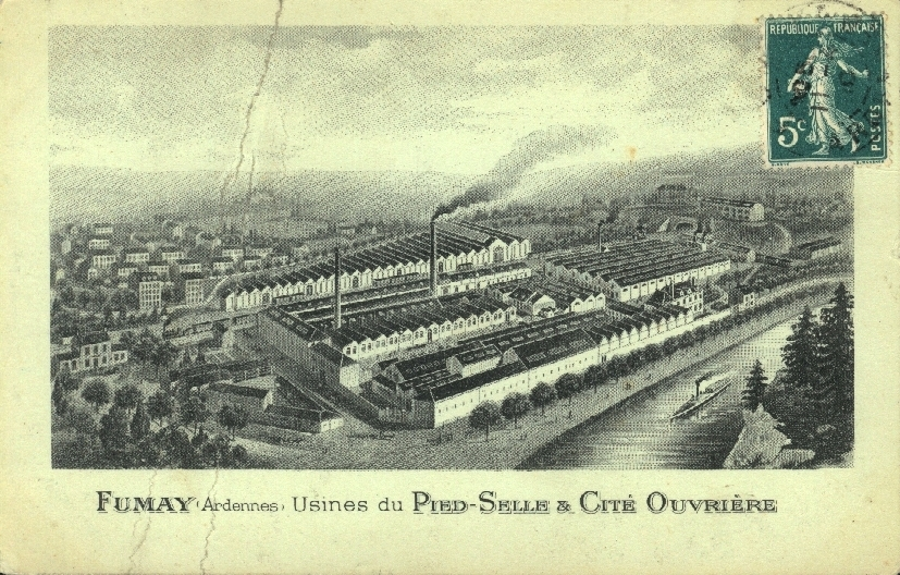 les usines du Pied Selle à Fumay (08)